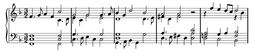 Premières mesures de la Galiarda n° 94 de W. Byrd, extr. du Fitzwilliam Virginal Book.